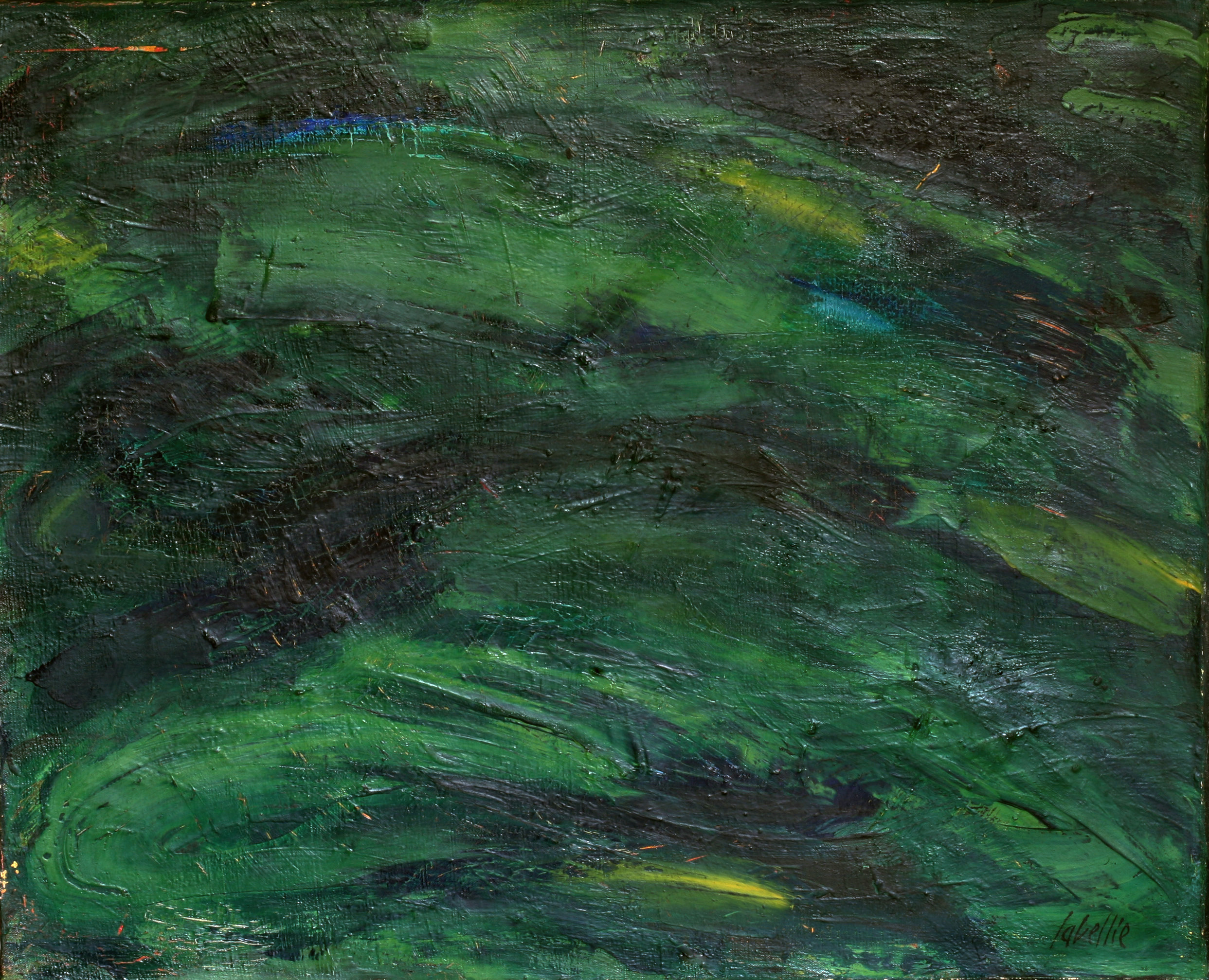 peinture